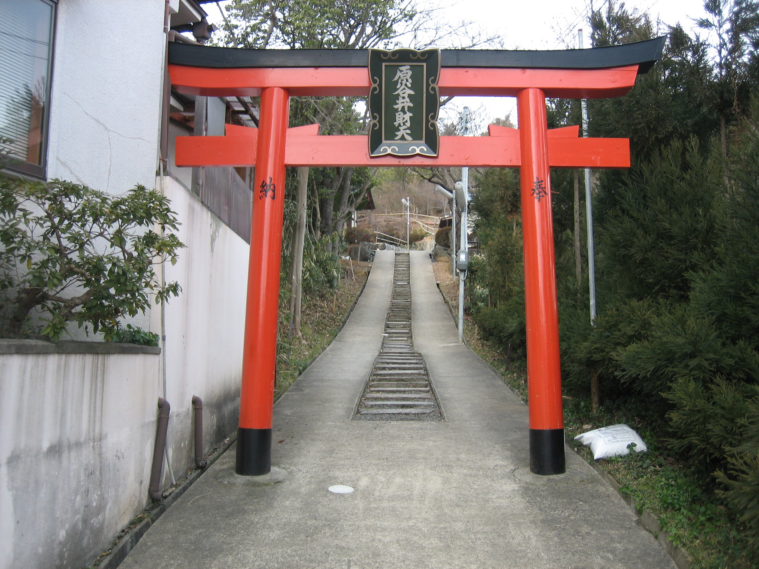 京都市北区大北山原谷乾町から原谷弁財天鳥居を撮影